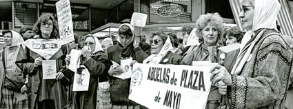 Las Madres y Abuelas de Plaza de Mayo 16 de septiembre 1988